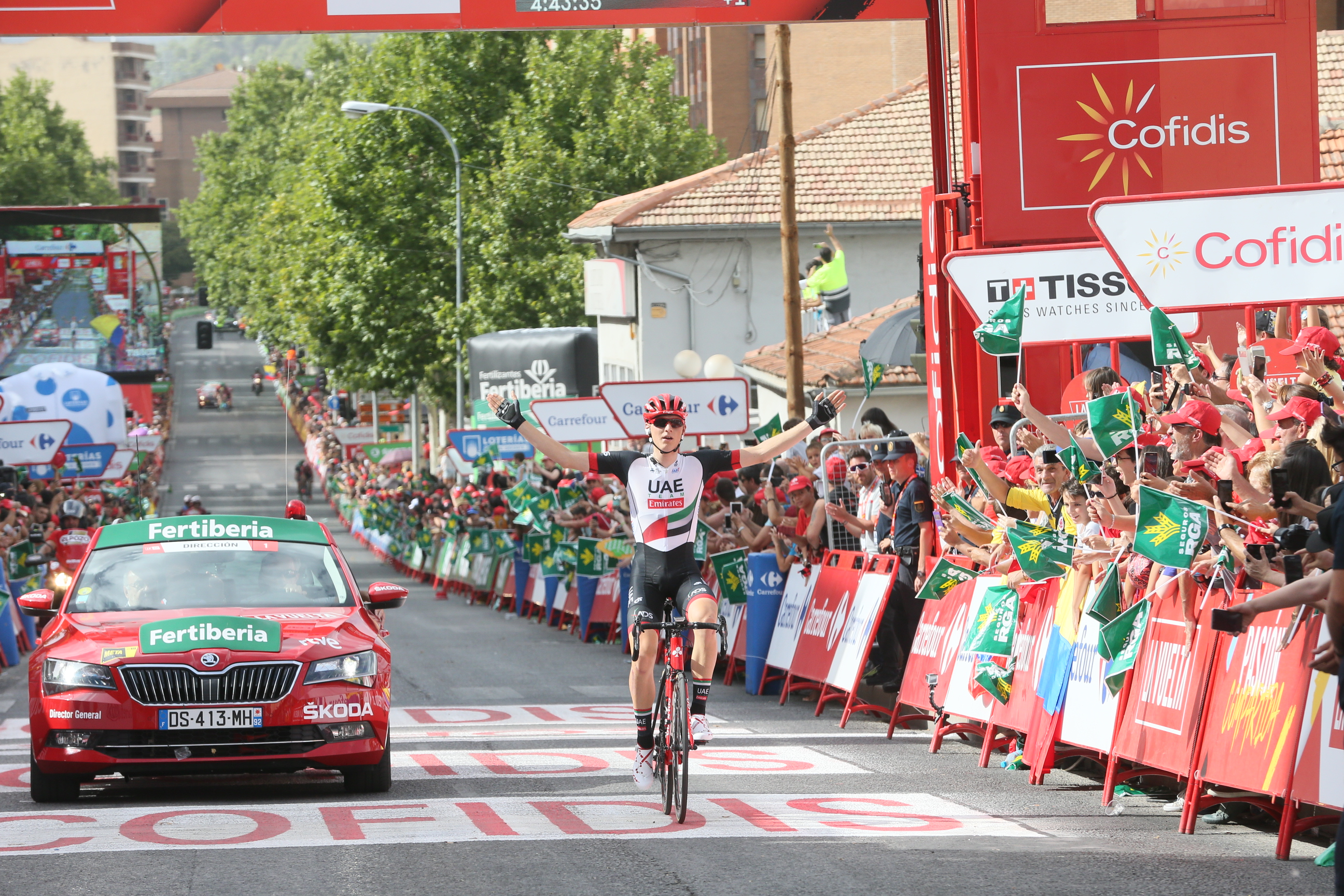 CUENCA, 25/08/2017. El presidente de Castilla-La Mancha, Emiliano García-Page, asiste al final de la séptima etapa de La Vuelta Ciclista a España, con meta en la capital conquense, donde hará entrega del premio al líder provisional de la clasificación general. (Fotos: Ignacio López//JCCM)